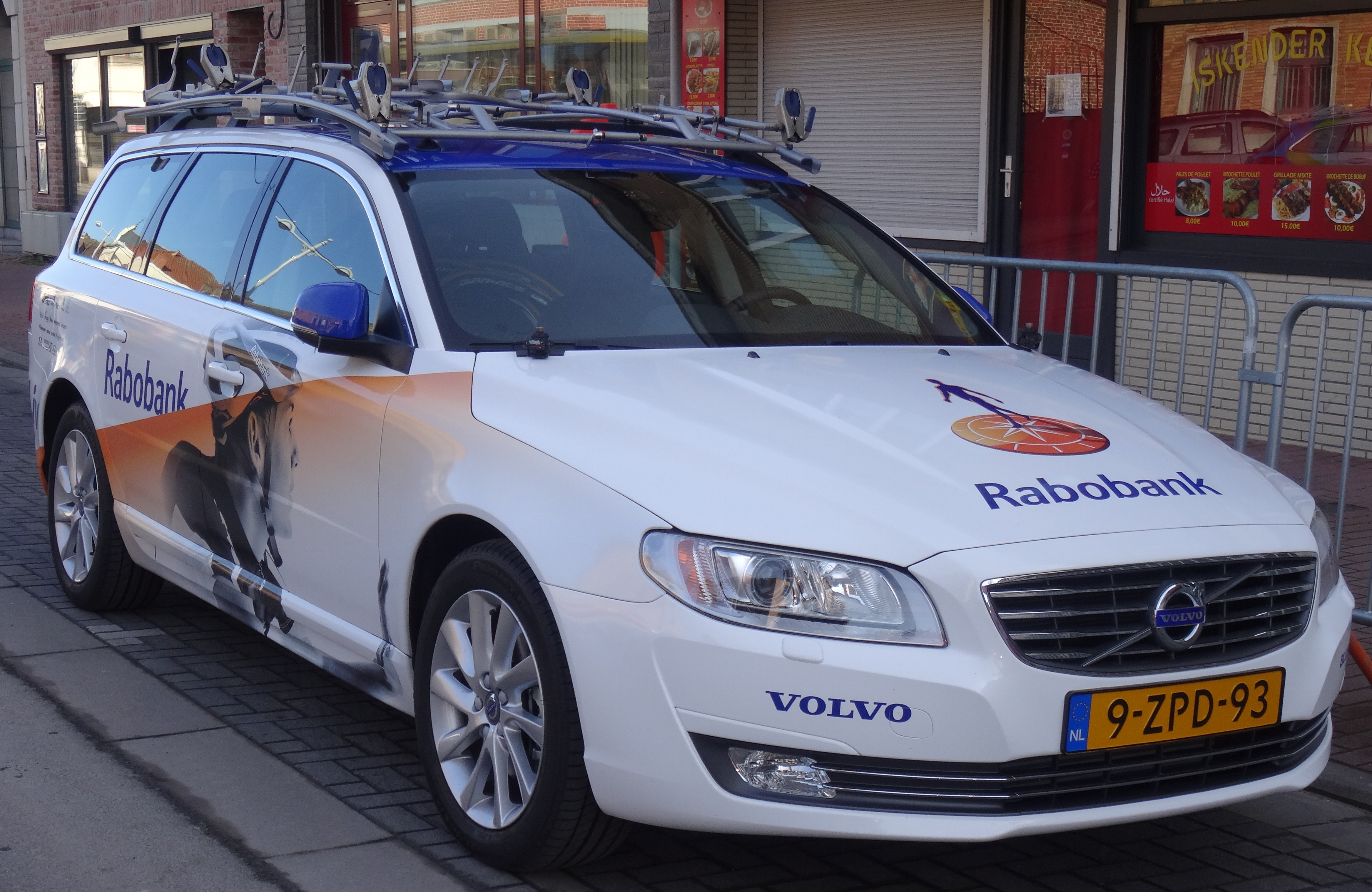 Reportage réalisé le mercredi 4 mars à l'occasion du départ du Samyn des Dames 2015 et du Samyn 2015 à Quaregnon, Belgique.